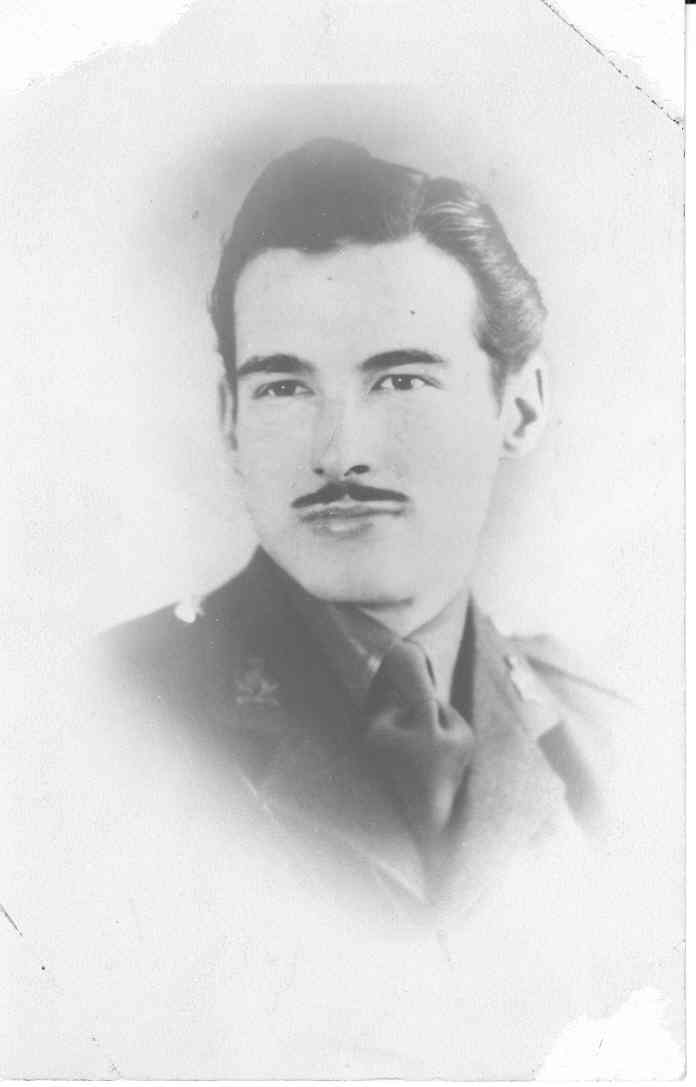 Roméo Sabourin, photo militaire prise entre 1939 et 1944.